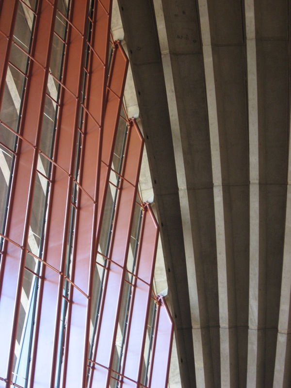 Detalle de la estructura del edificio de la Ópera de Sydney